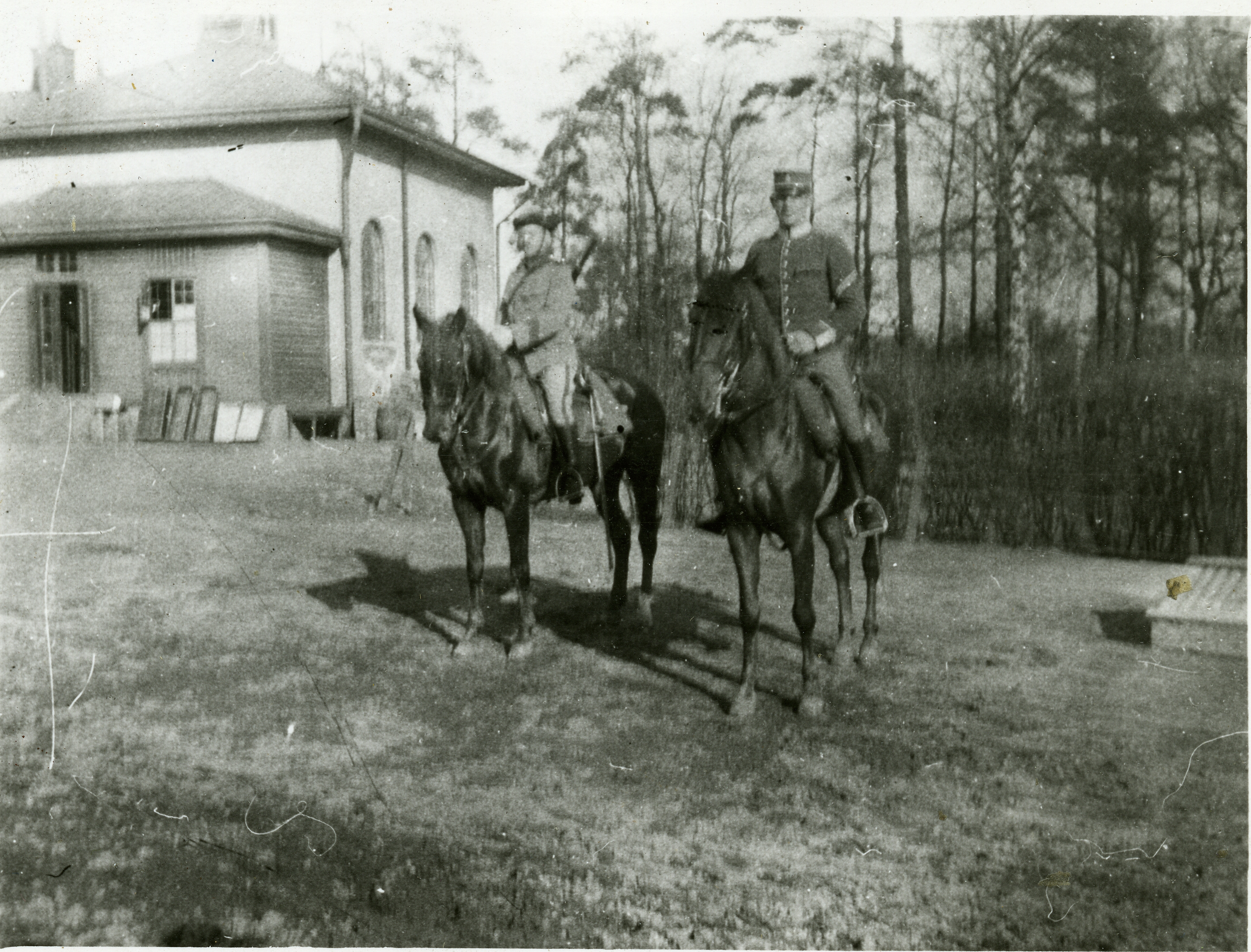 Remontridning vid K 1 Identifikationsnr: AMA.0009965 Samling: Armémuseum